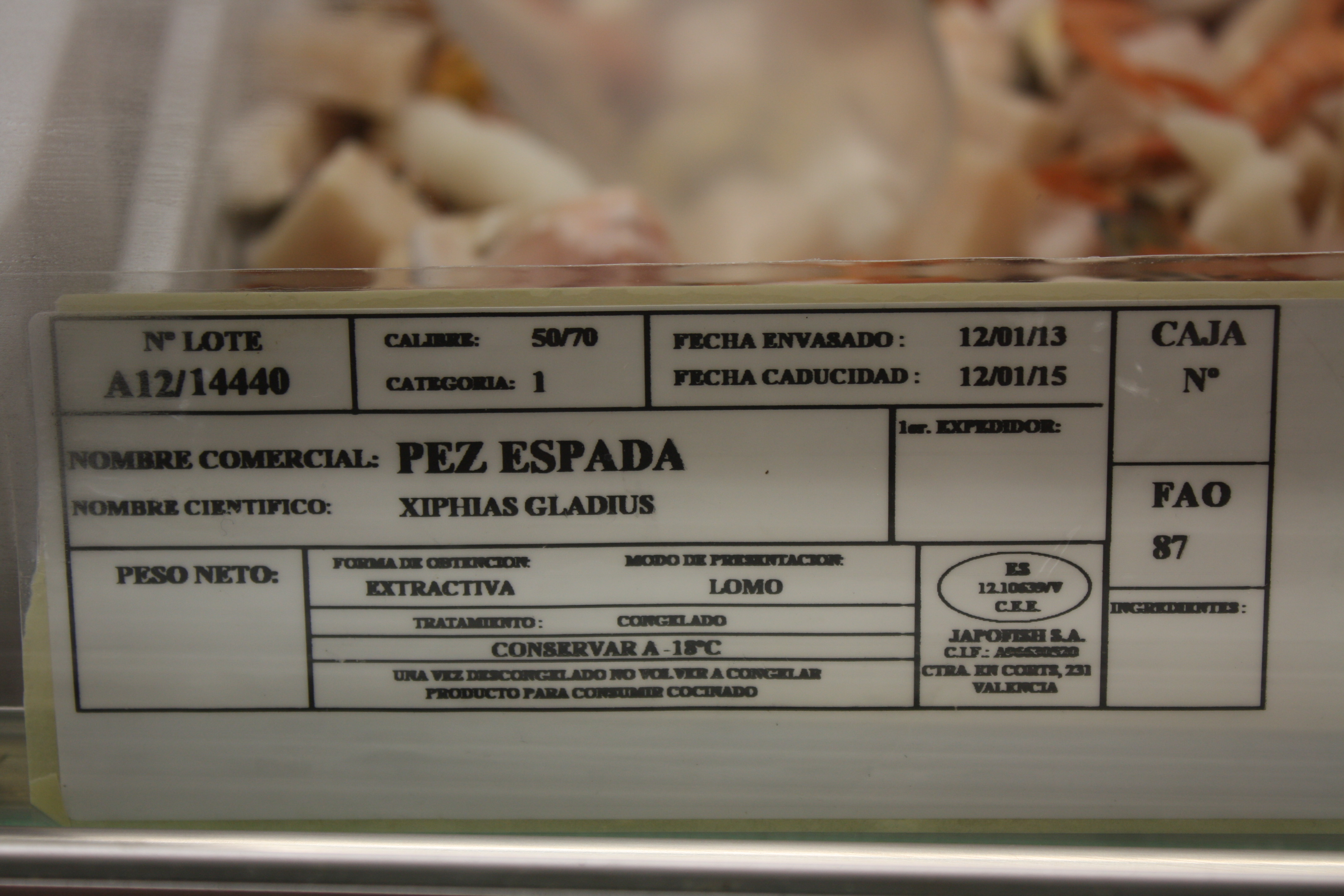 Marcado de datas erróneo nun peixe espada conxelado (a fotografía foi tomada o 23.07.2012).